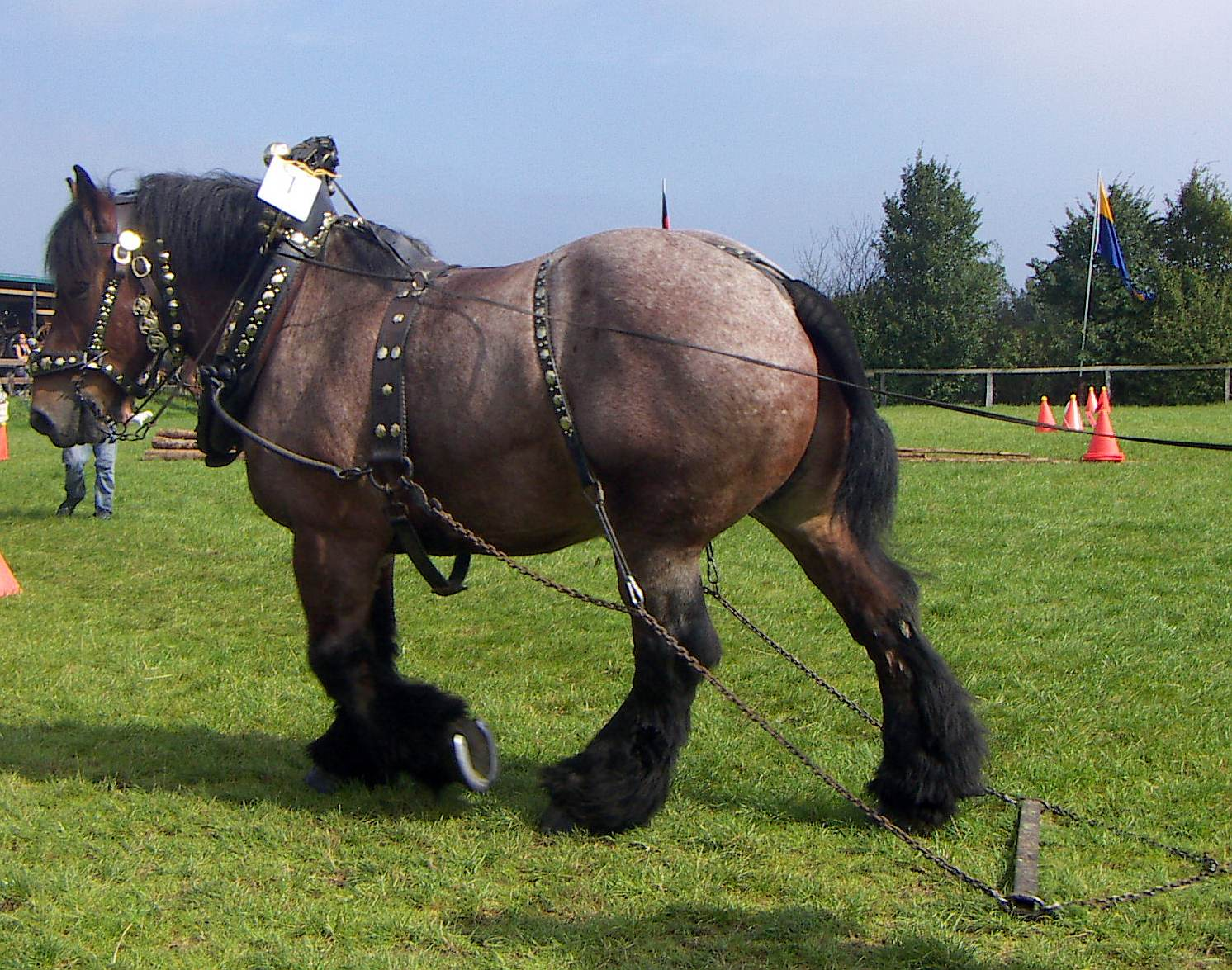 Ardenner, Gezäumt als Rückepferd